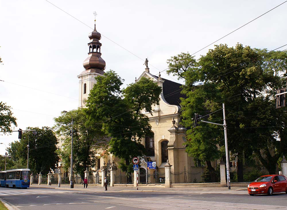 Kościół św. Maurycego Traugutta 36, Miasto Wrocław - Krzyki